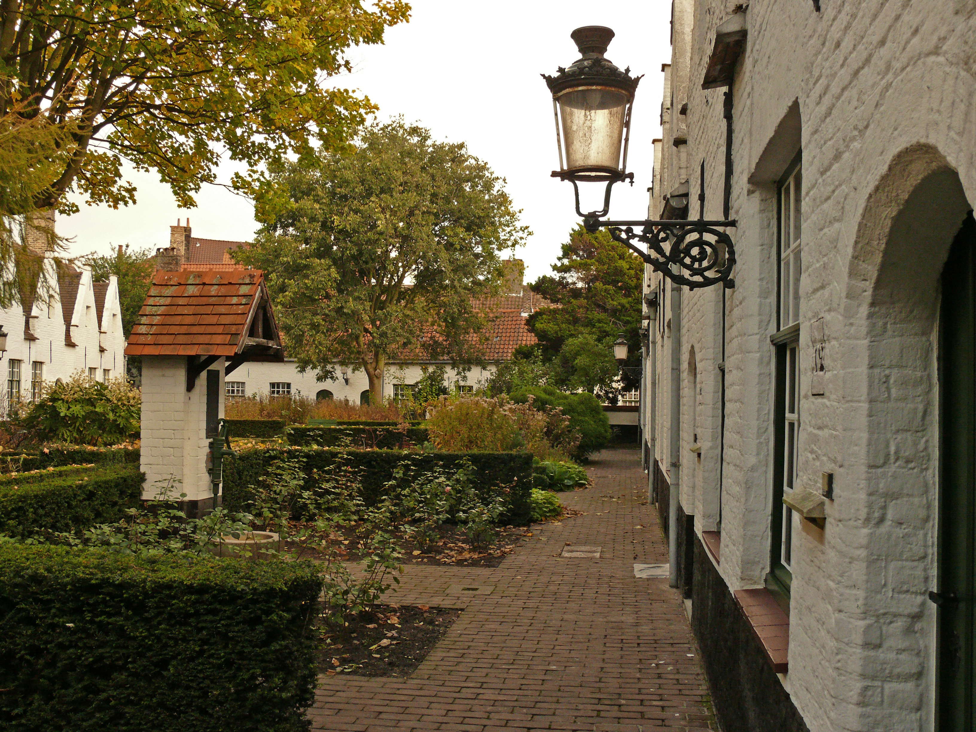 14 kleine, witgekalkte huisjes ron een binnentuin